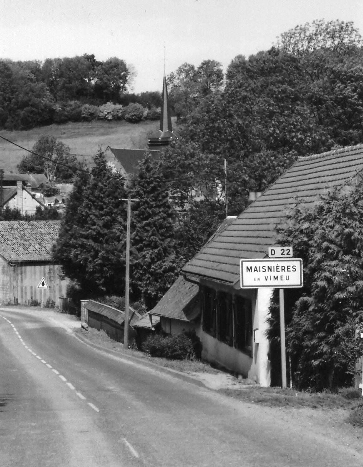 Entrée du village de Maisnières (Somme, France), en venant de Gamaches.